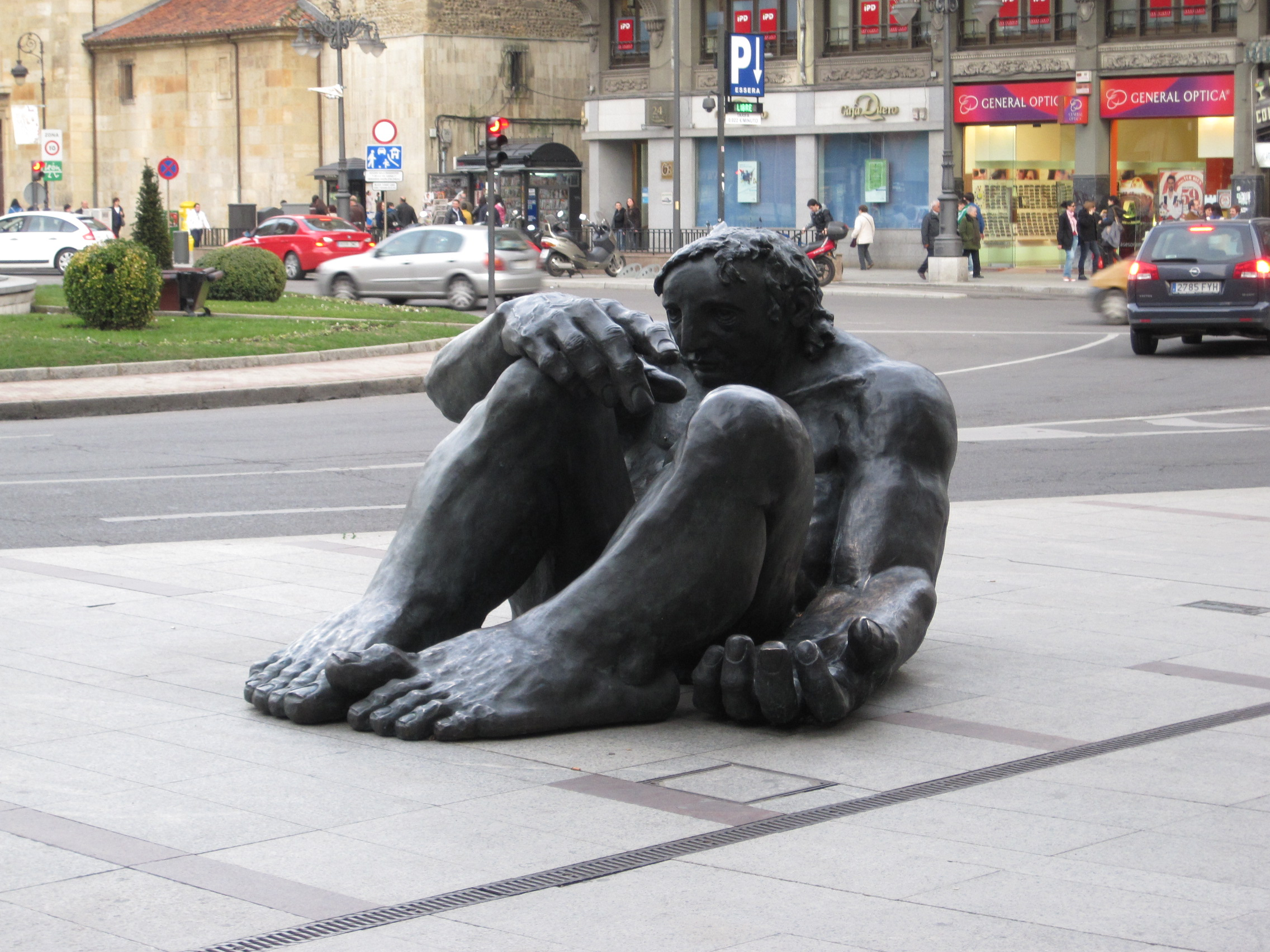 La Negrilla, una de las esculturas más famosas de la capital de León.